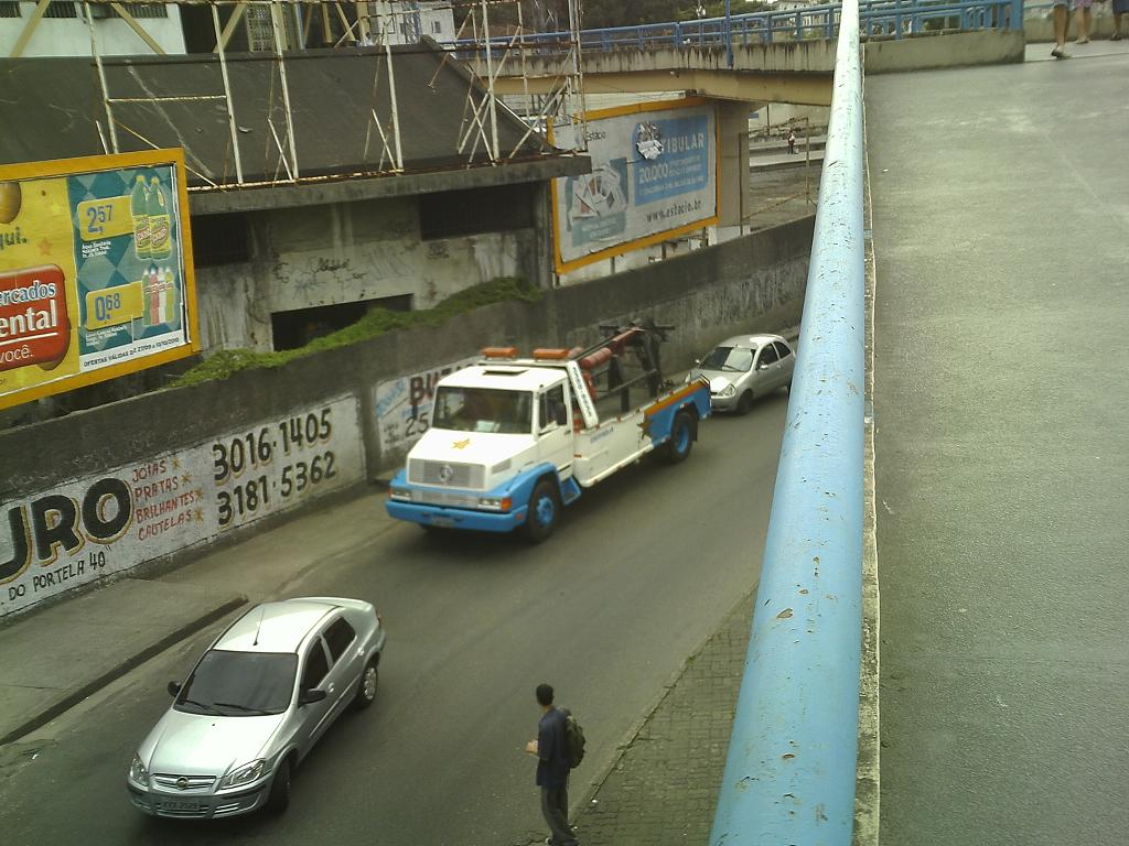 Viação Estrela.